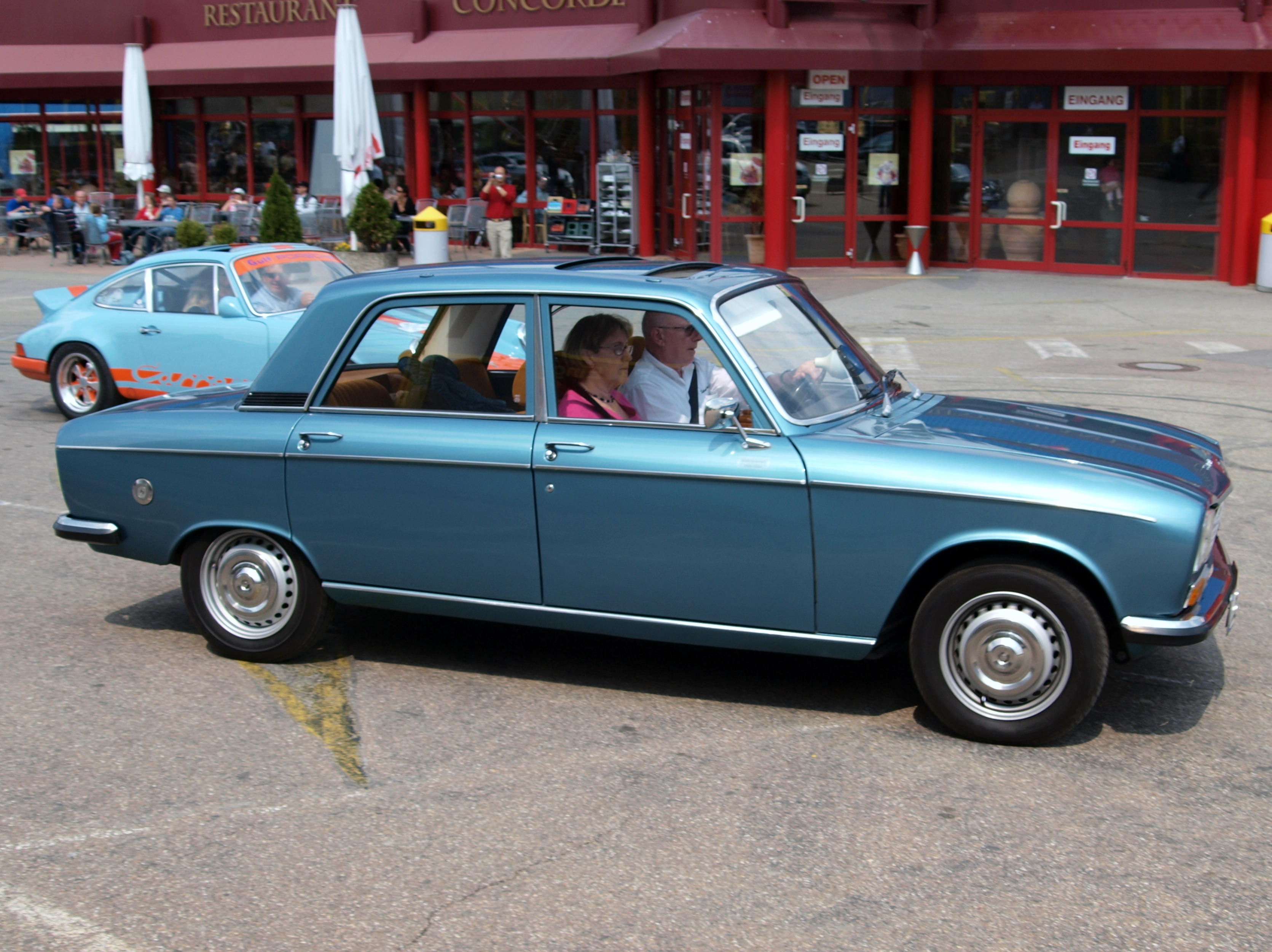 Photographed at the Technik museum Sinsheim, Germany. Participating in the Kurpfalz-Klassik rund um die 1. Tankstelle der Welt.